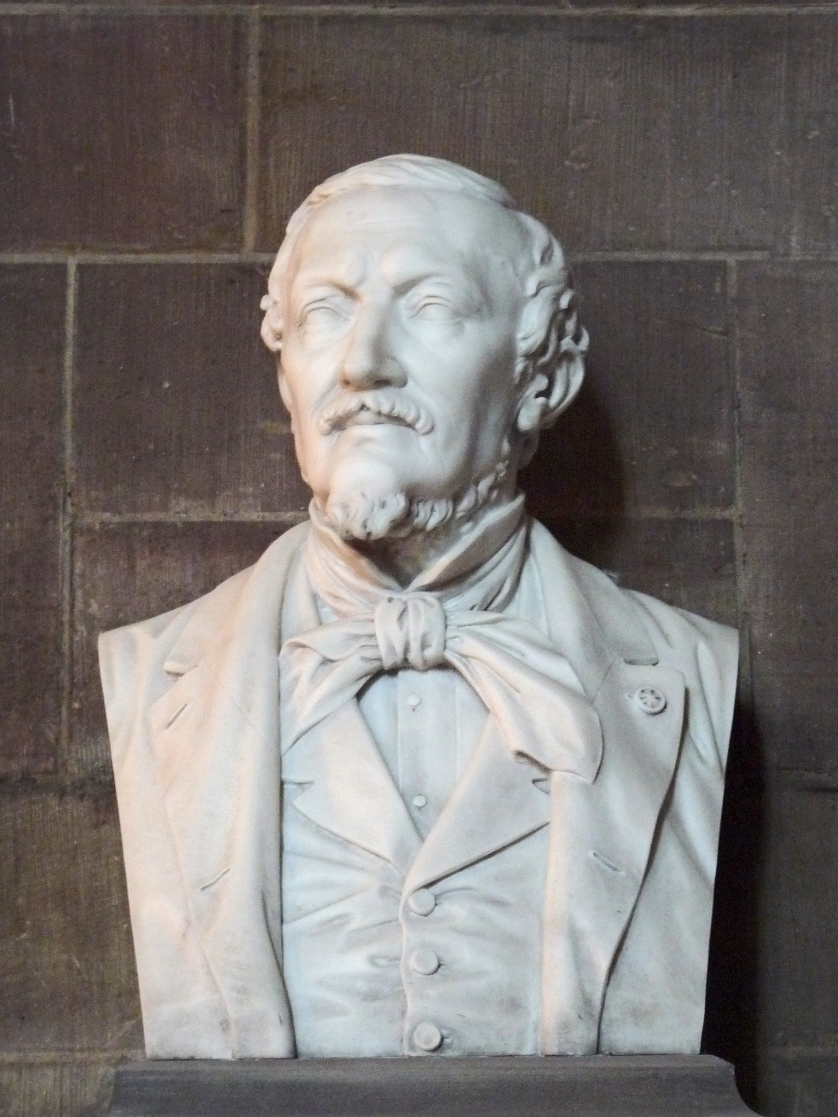 Strasbourg, Temple Neuf : buste de Jules Conrad Sengenwald (1809-1891), Président de la Chambre de Commerce de Strasbourg et bienfaiteur de la paroisse. Signé par Louis Stienne, 1889